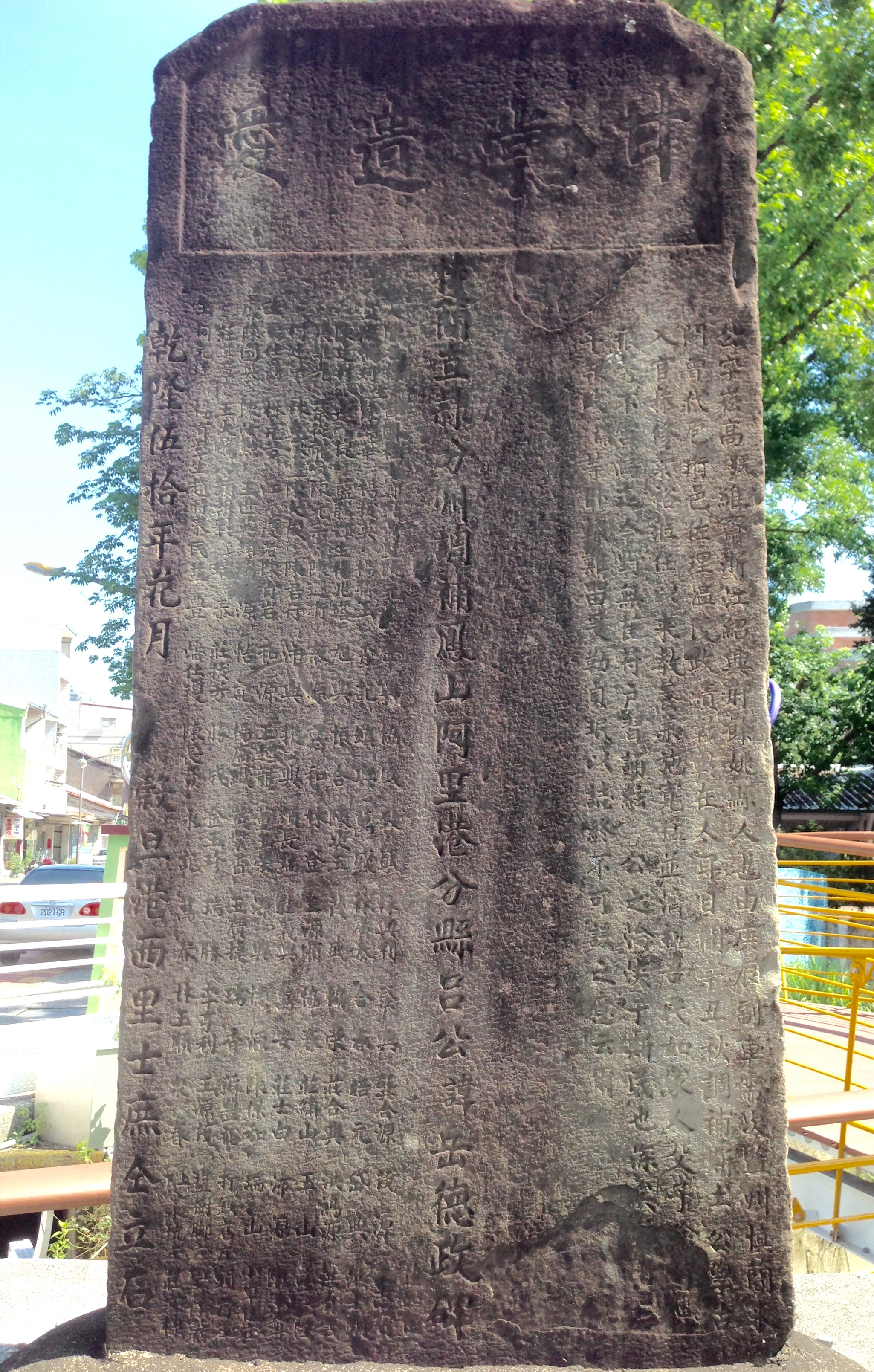 中文（台灣）: 特簡直隸分州調補鳳山阿里港分縣呂公諱岳德政碑，簡稱呂岳德政碑。